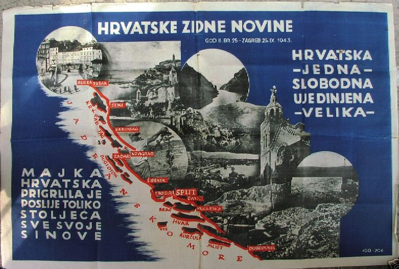 Zidne novine NDH, broj povodom kapitulacije Italije